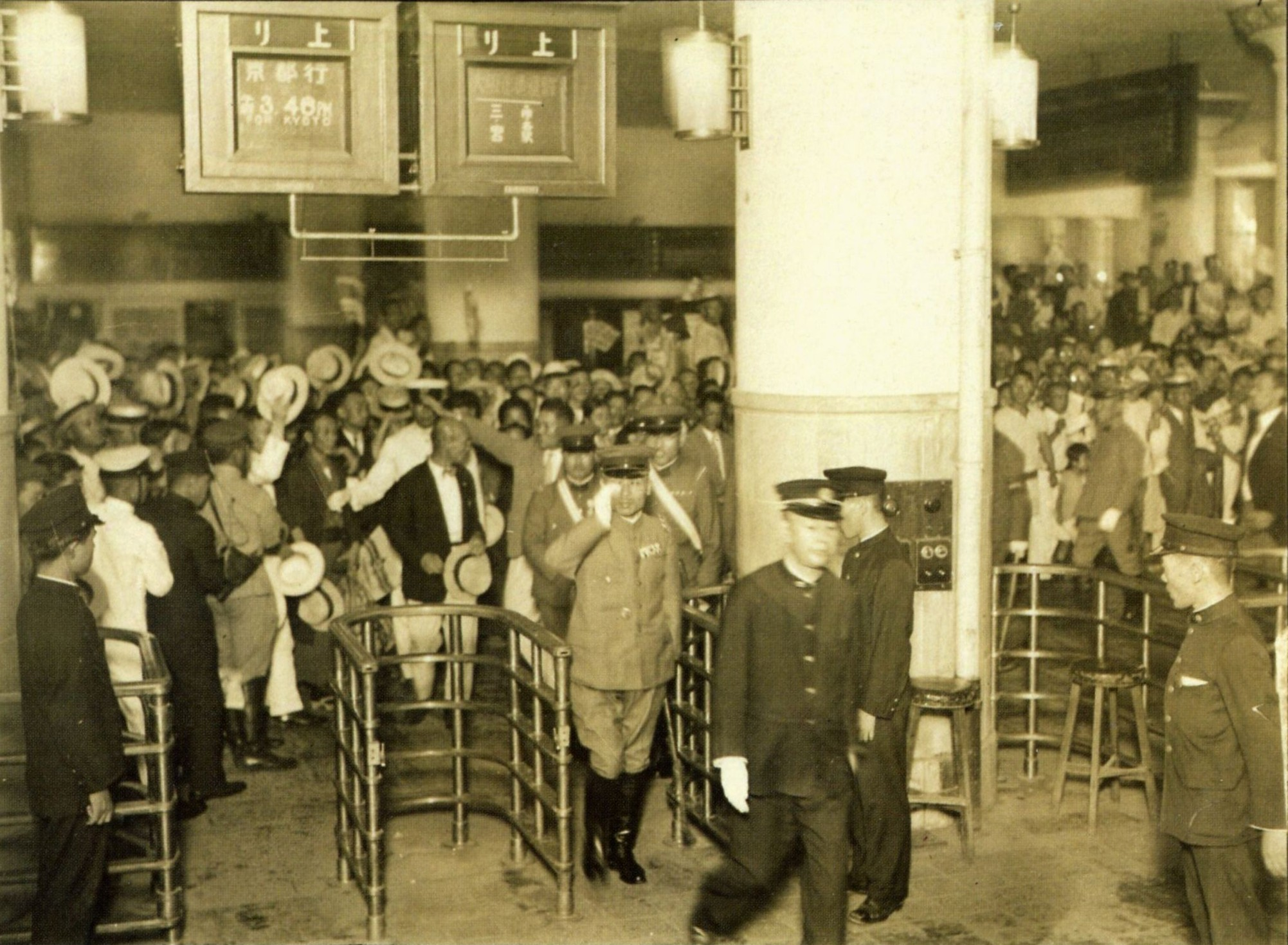 神戸駅から東京に向かう本庄繁・前関東軍司令官と出迎えの群衆。当時の駅舎は現存。